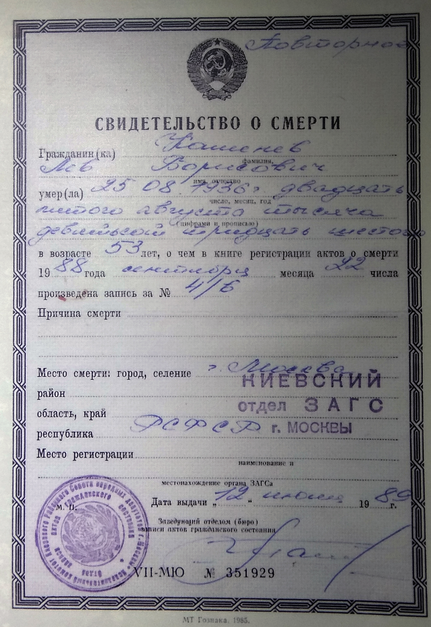 Фоторепродукция свидетельства о смерти Льва Борисовича Каменева, расстрелянного по приговору Военной коллегии Верховного суда СССР 25 августа 1936 года. Свидетельство выдано 12 июля 1989 года Киевским отделом ЗАГС города Москвы. Подлинная причина смерти не указана. В настоящее время хранится в Музее политической истории России в Санкт-Петербурге.